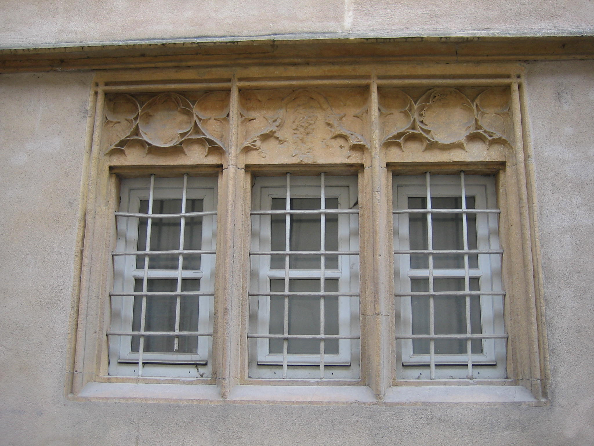 L'hôtel de Gargan est une bâtisse historique de la ville de Metz, rue Nexirue. C'est une construction du XVe siècle, de style gothique. Les tympans de fenêtres de style gothique flamboyant datent l'édifice du XVe siècle.